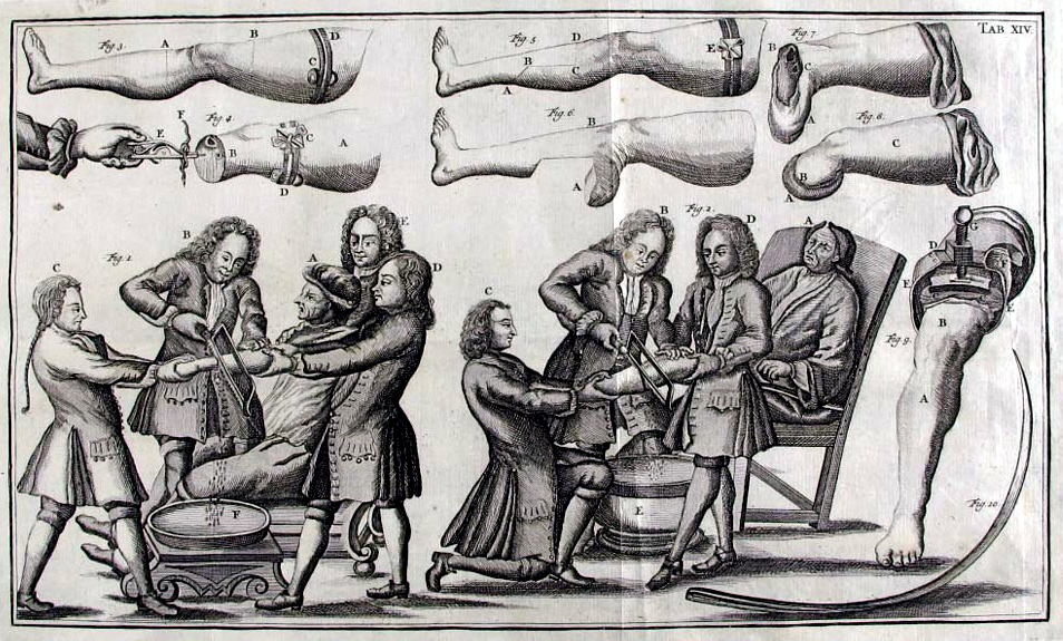 Amputation von Gliedmaßen, Kupferstich, frühes 18. Jh., Plattenmaß 19 x 32 cm, "Tab. XIV" aus einem Buch